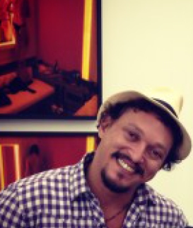 Fábio Lago (Ilhéus, 13 de março de 1970) é um ator brasileiro. Ficou mais conhecido por trabalhar na telenovela brasileira Caras & Bocas, exibida no horário das 19 horas da TV Globo, como o cômico Fabiano. Outro papel de destaque de Fábio foi em Tropa de Elite, como o violento traficante Claúdio, mais conhecido como "Baiano".